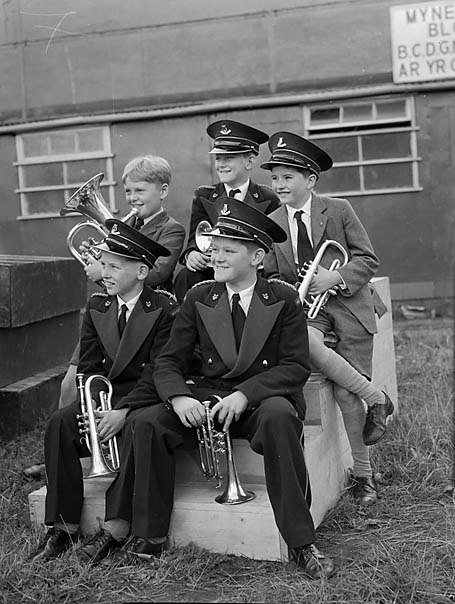 Teitl Cymraeg/Welsh title: Eisteddfod Genedlaethol 1960, Caerdydd Ffotograffydd/Photographer: Geoff Charles (1909-2002) Dyddiad/Date: August 11, 1960. Cyfrwng/Medium: Negydd ffilm / Film negative Cyfeiriad/Reference: (gch16779) Rhif cofnod / Record no.: 3370848 Rhagor o wybodaeth am gasgliad Geoff Charles yn Llyfrgell Genedlaethol Cymru More information about the Geoff Charles Collection at the National Library of Wales Mae ffotograffau Geoff Charles hefyd yn rhan o Broject Europeana Libraries Geoff Charles' photographs also form part of the Europeana Libraries Project